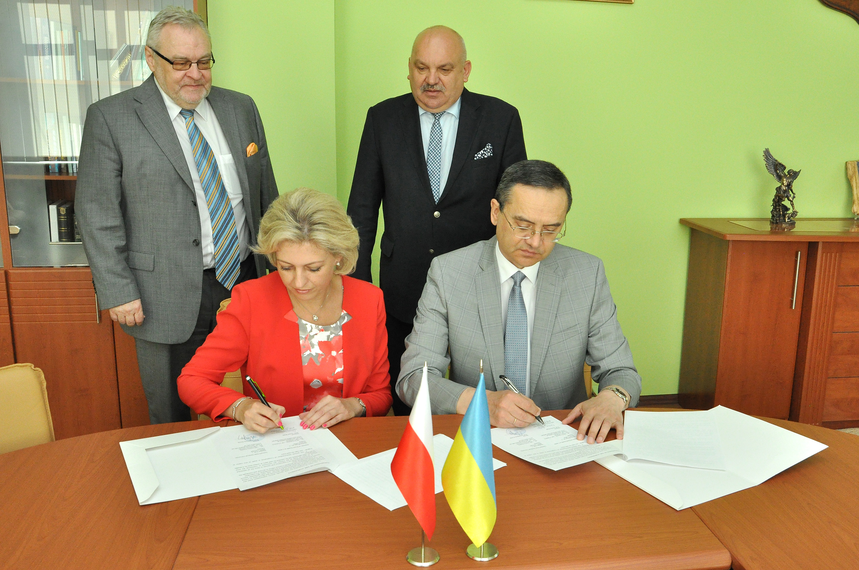 Івона Бояр і Михайло Корда підписують угоду про співпрацю між Інститутом сільської медицини в Любліні і Тернопільським державним медичним університетом.